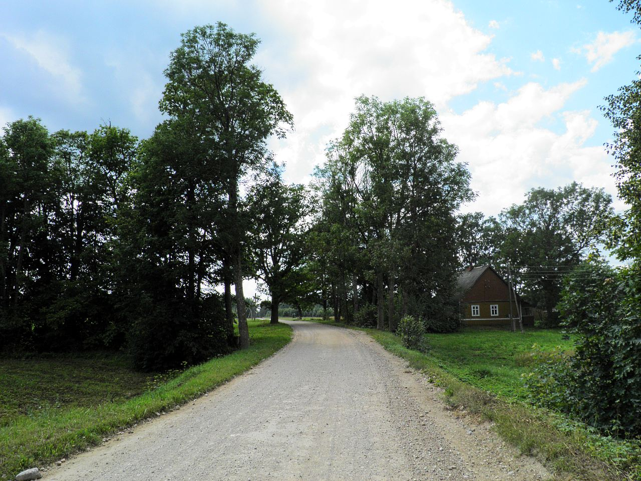 Susēja (4)